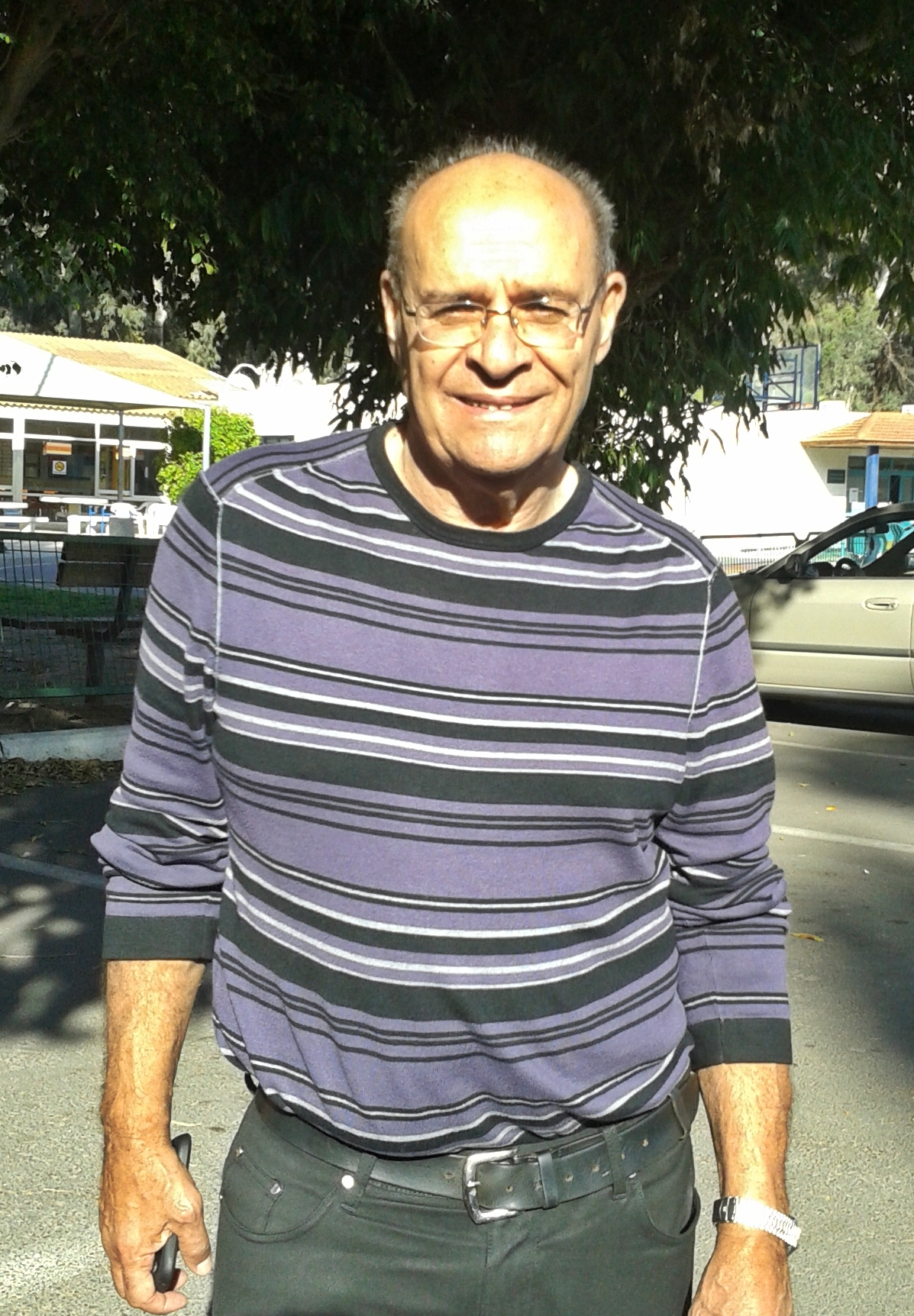 ברוך חגאי, במרכז הספורט לנכים